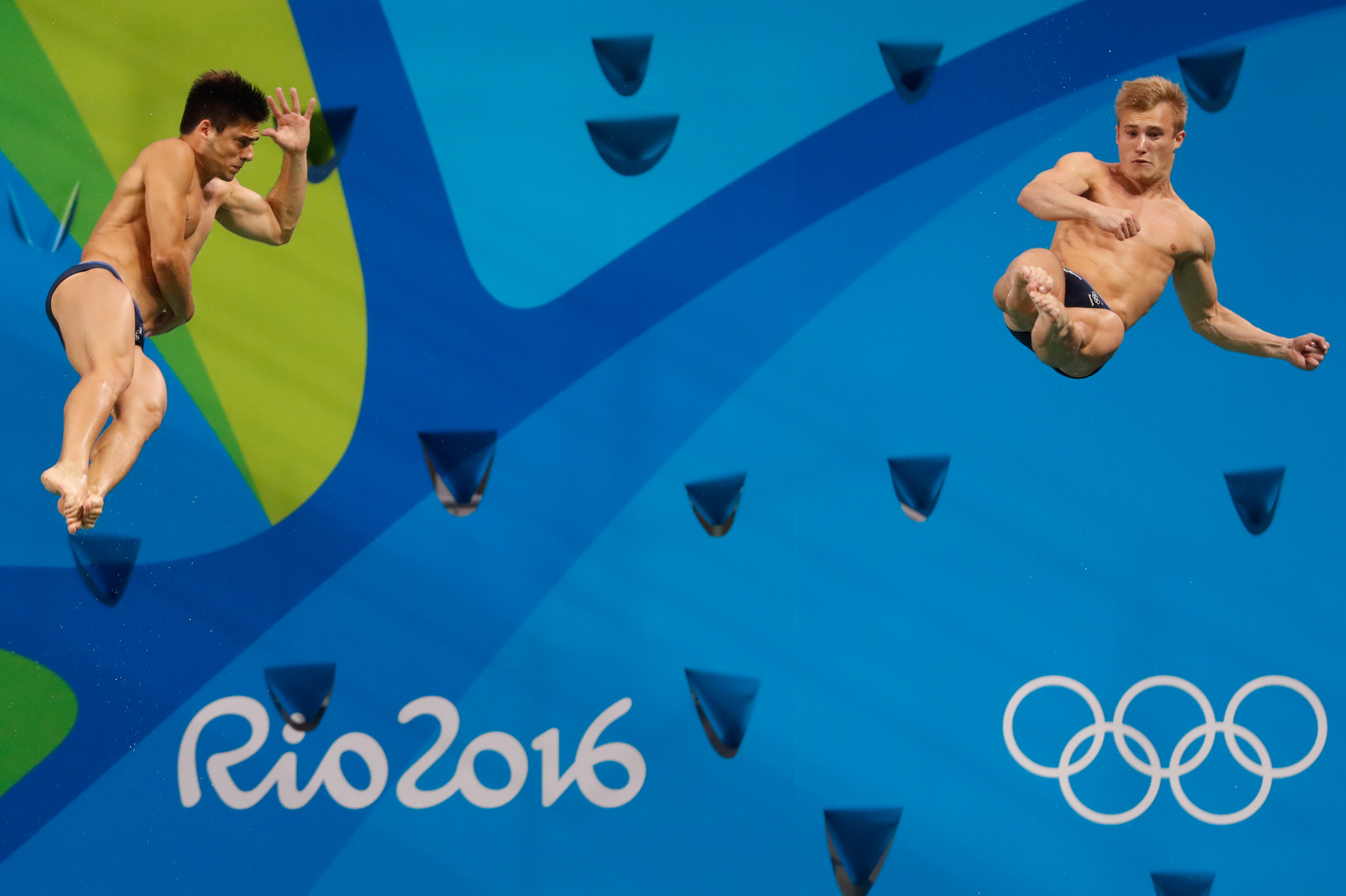 Rio de Janeiro - Britânicos Jack Laugher e Chris Mears é ouro no trampolim de 3 metros sincronizado dos saltos ornamentais nos Jogos Olímpicos Rio 2016, no Parque Aquático Maria Lenk (Fernando Frazão/Agência Brasil)